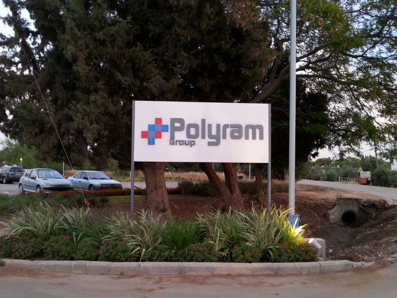 לוגו המפעל